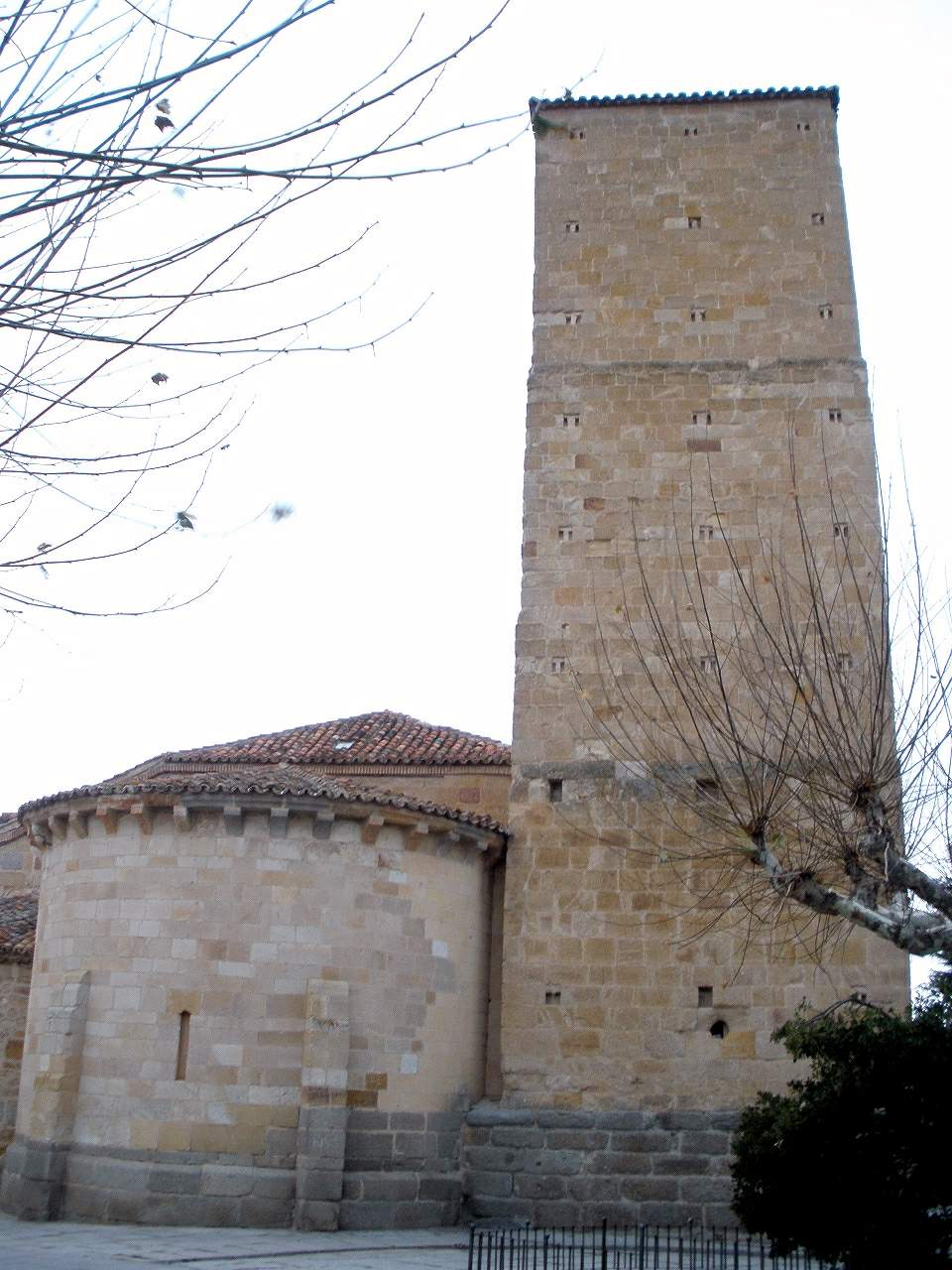 Iglesia de San Nicolás de Bari (Ávila)